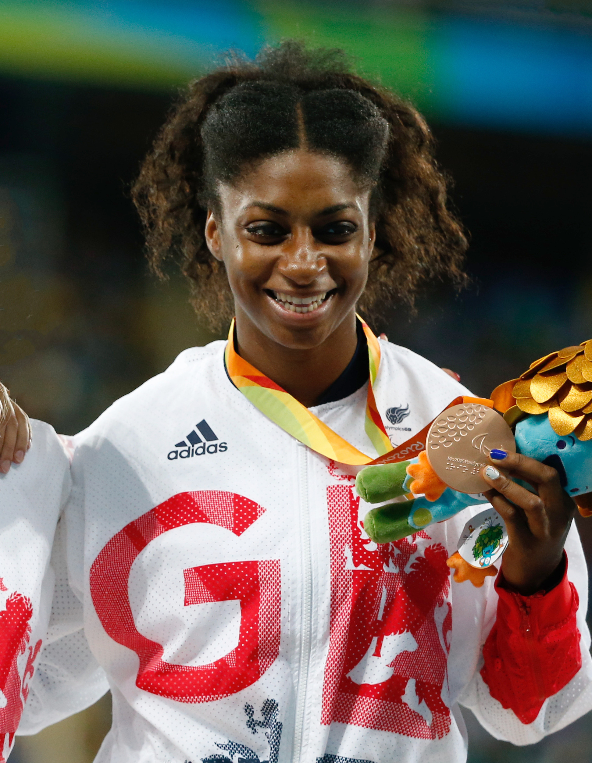 Rio de Janeiro - Brasileira Veronica Hipolito leva medalha de prata nos 100m T38 nos Jogos Paralímpicos Rio 2016, no Estádio